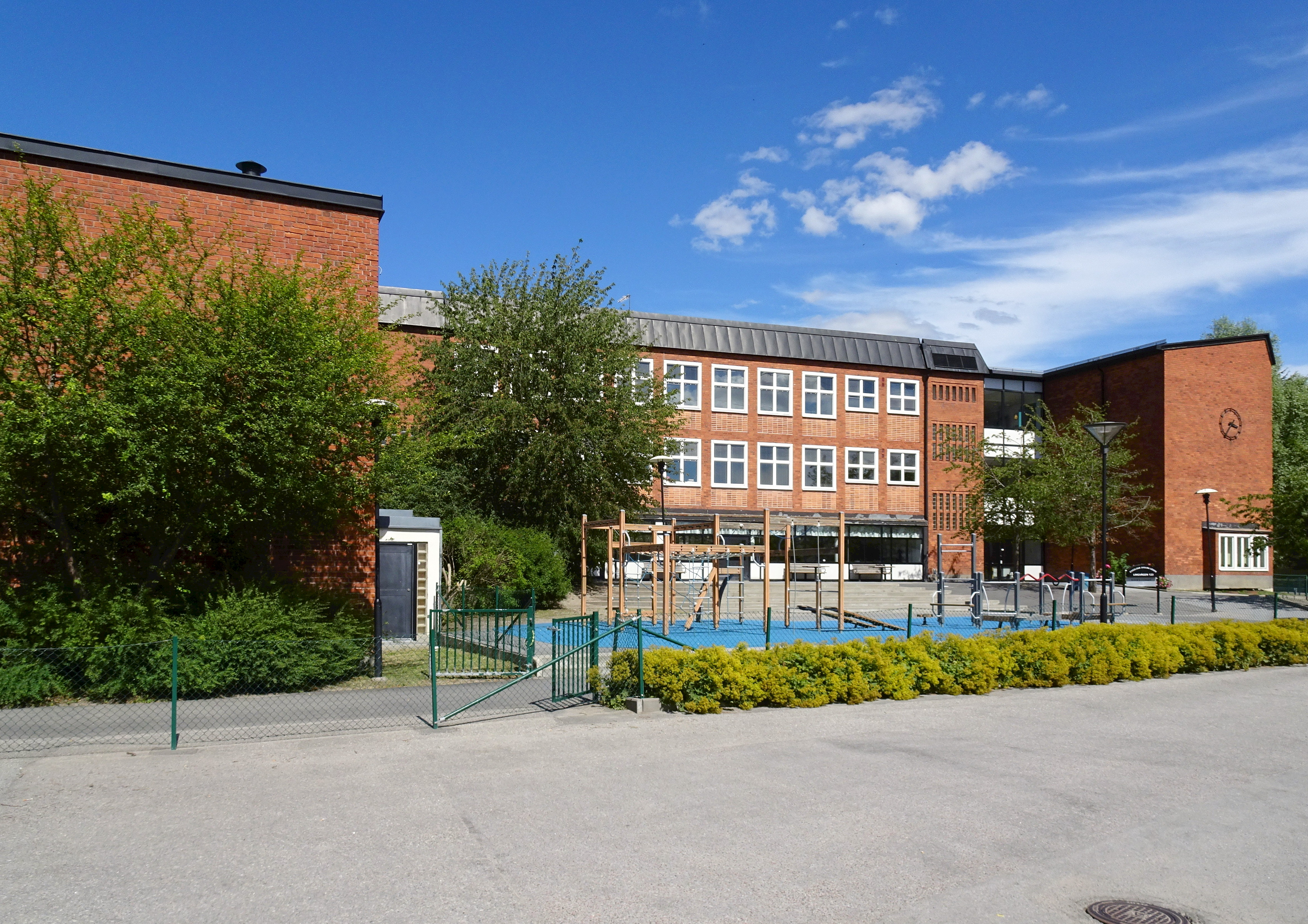 F.d. Gubbängens gymnasium